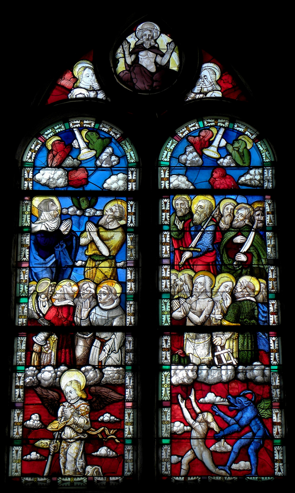 Baie 07 de la chapelle Notre-Dame de Kergoat en Quéménéven (29).